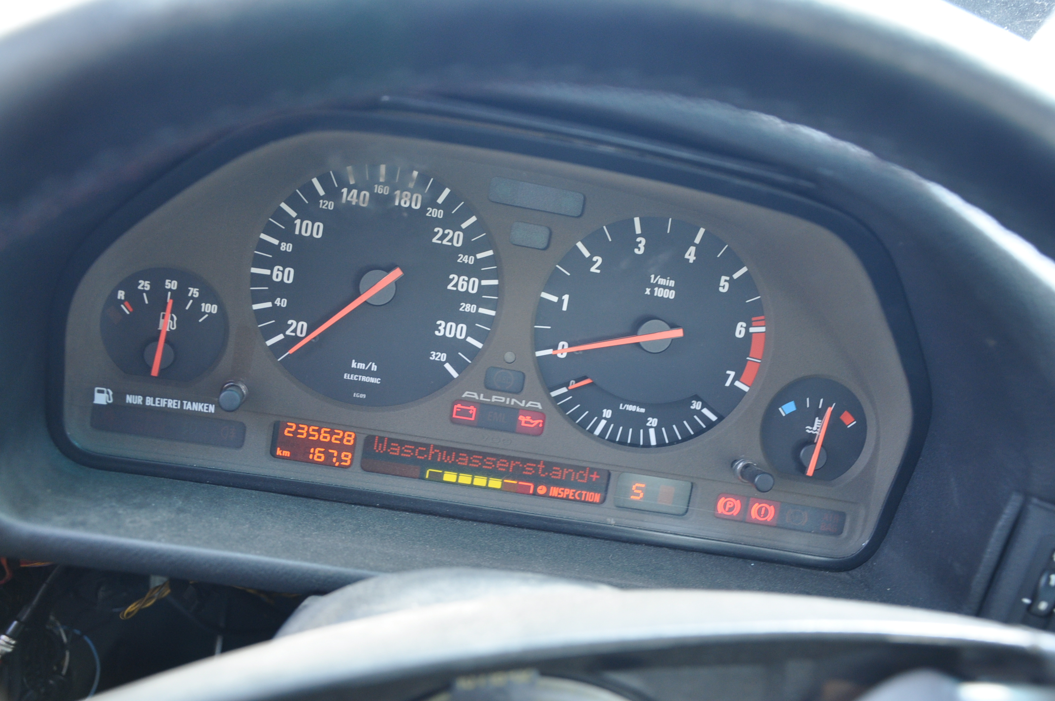 Tablica przyrządów BMW 750iL e32, Alpina B12 5.0l, V12.